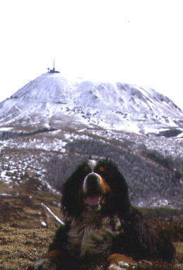 Le Puy-de-Dôme sous la neige avec en premier plan un Bouvier Bernois